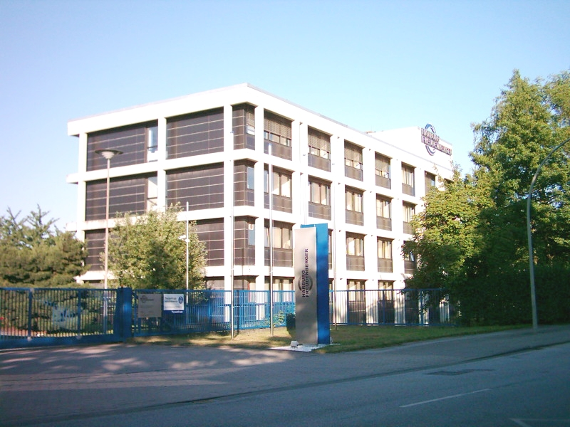 Harburg Freudenberger in Hamburg-Harburg.